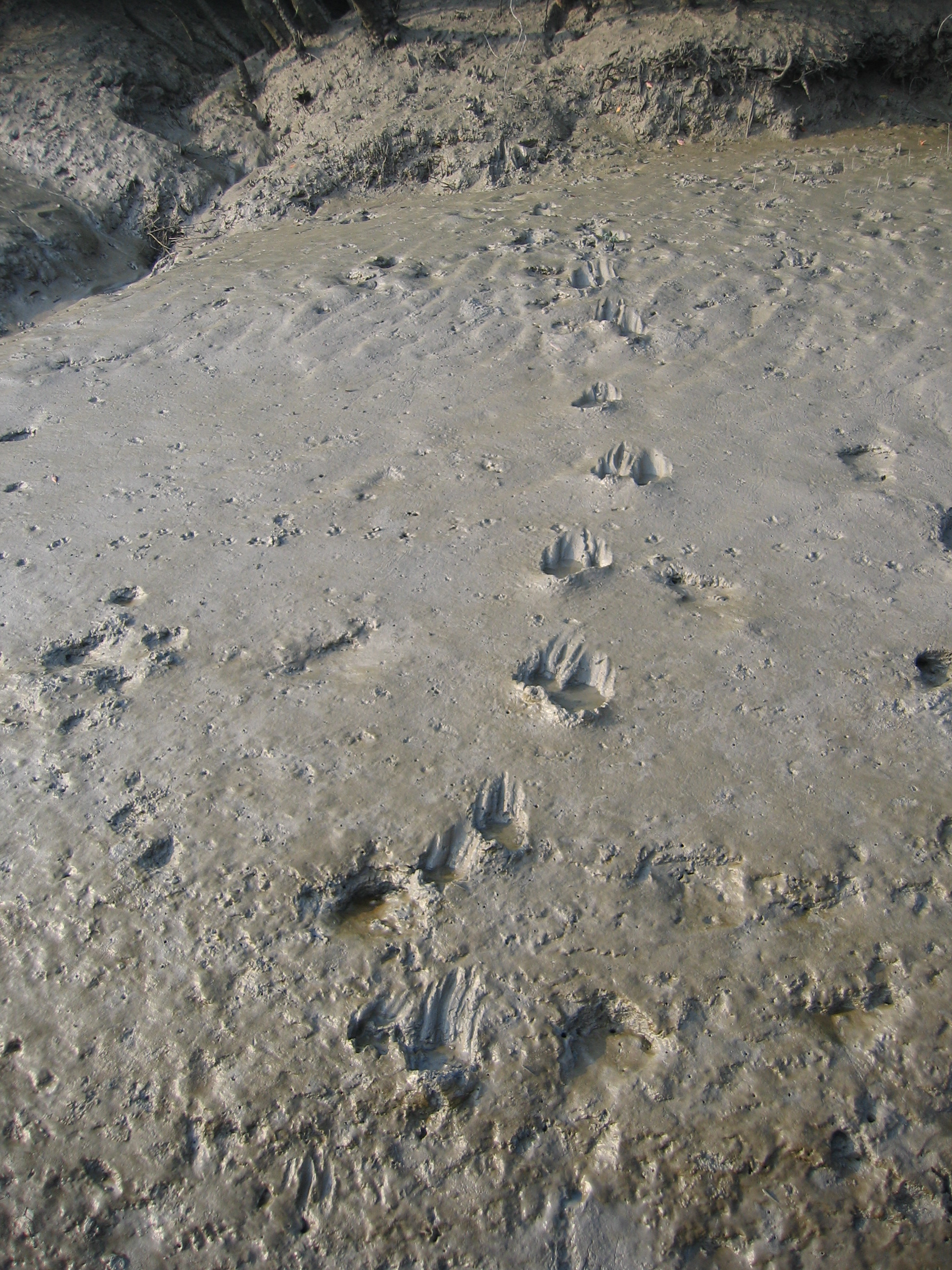 Sunderbans National Park From tiger